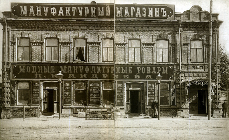 Дом Павла Васильевича Круглова в Челябинска. Фотография сделана до 1910 года.